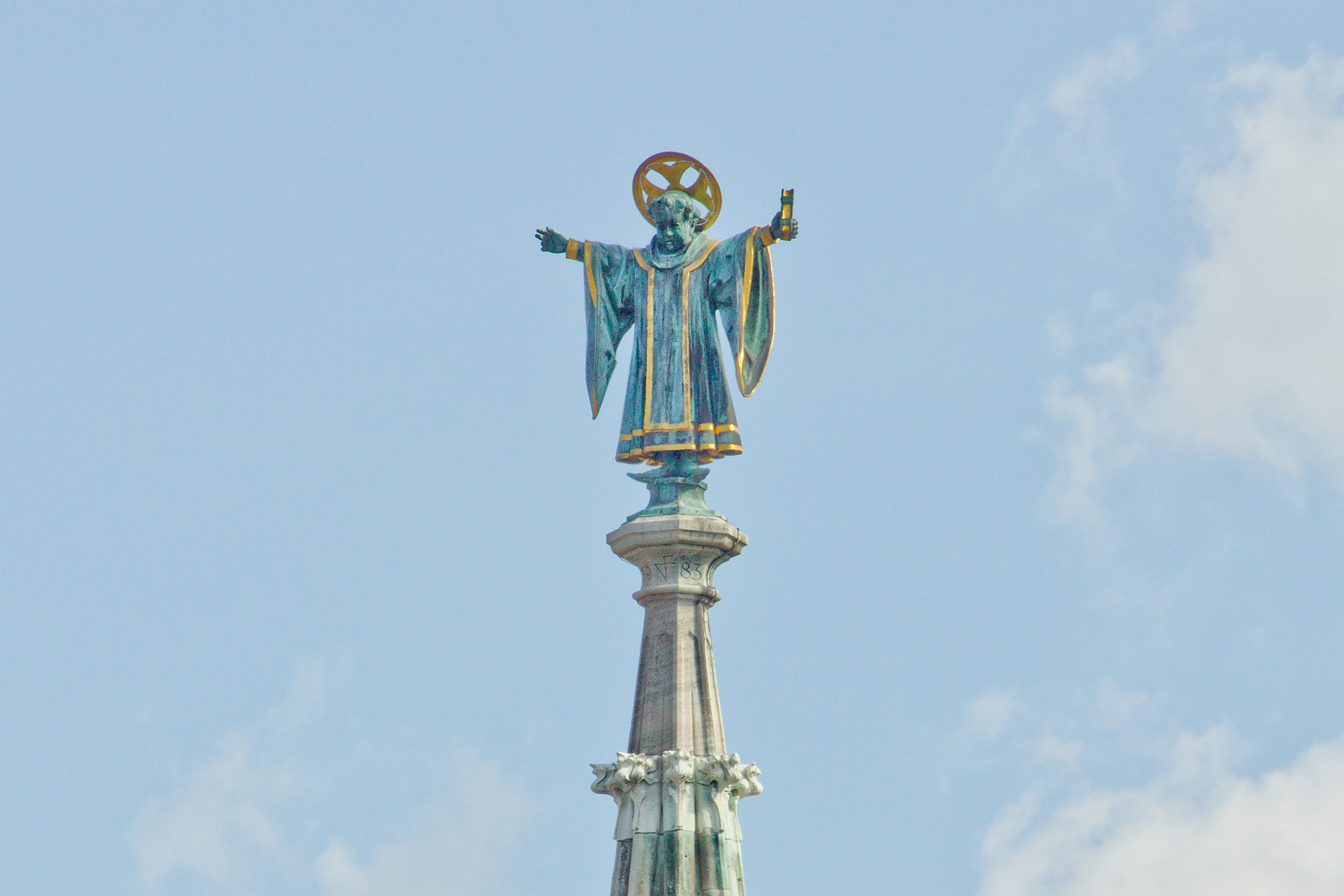 Wikipedia im Landtag – Bayern 17. bis 19. Juli 2012 in München Dieses Foto wurde im Rahmen des Projektes „Wikipedia im Landtag“ erstellt.